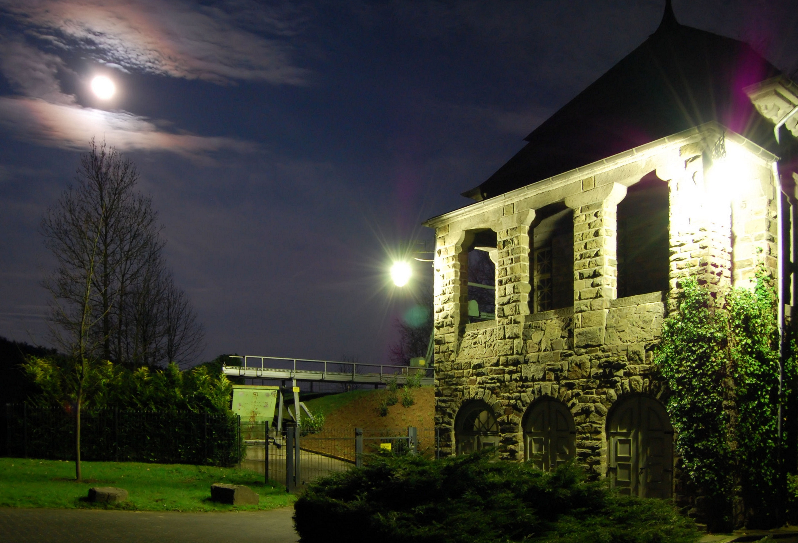 2008, Laufwasserkraftwerk (Nachtaufnahme)